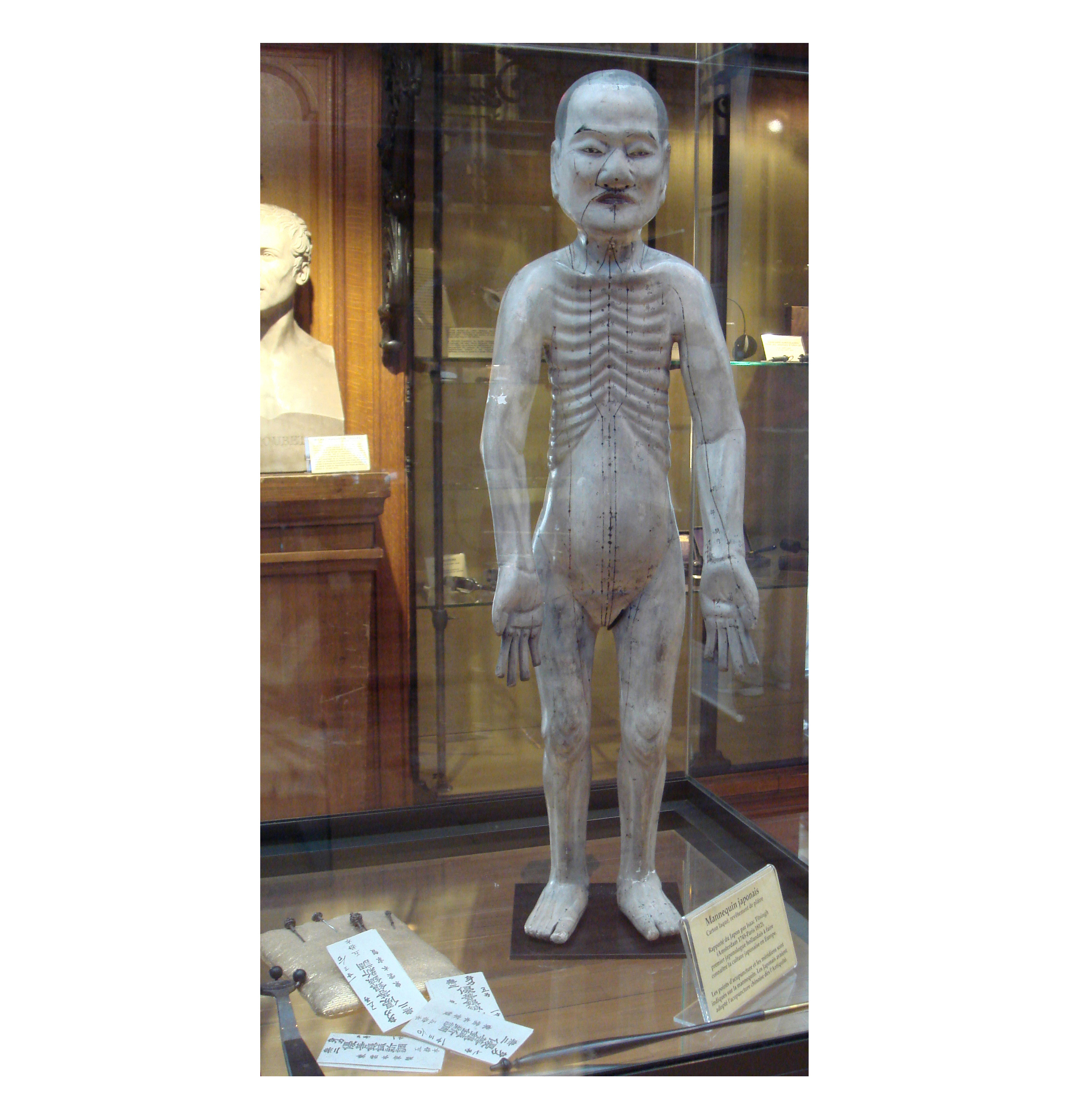 Akupunkturpuppe